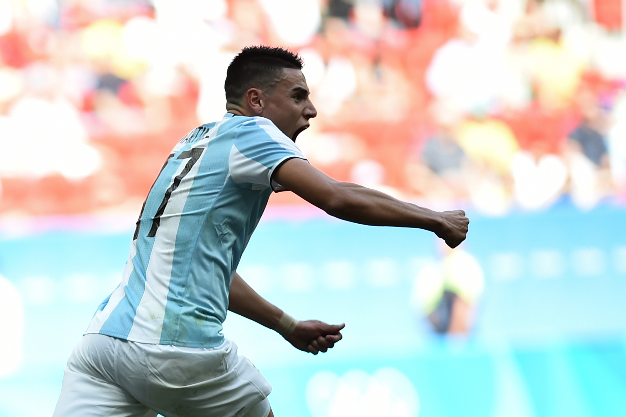 Estádio Nacional de Brasília Mané Garrincha, Brasília, DF, Brasil, 10/8/2016 Foto: Andre Borges/Agência Brasília Argentina e Honduras empataram por 1x1 nesta quarta-feira (10), no Estádio Mané Garrincha, em partida pelo grupo D do futebol masculino nas Olimpíadas 2016. O placar classificou Honduras para a próxima fase da competição e tirou a seleção argentina masculina da Olimpíada. Partido entre Argentina y Honduras por fase de grupos.